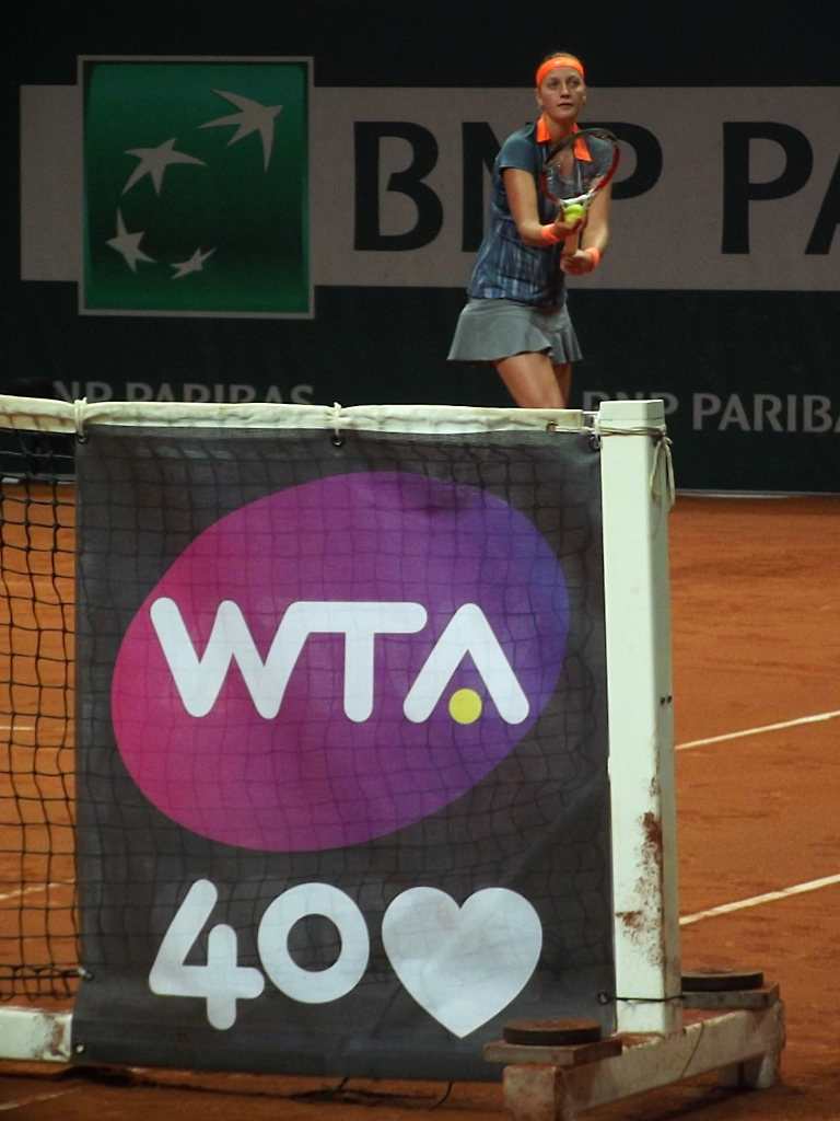 Zdjęcie zrobione podczas kobiecego turnieju tenisowego BNP Paribas Katowice Open, w katowickim Spodku.